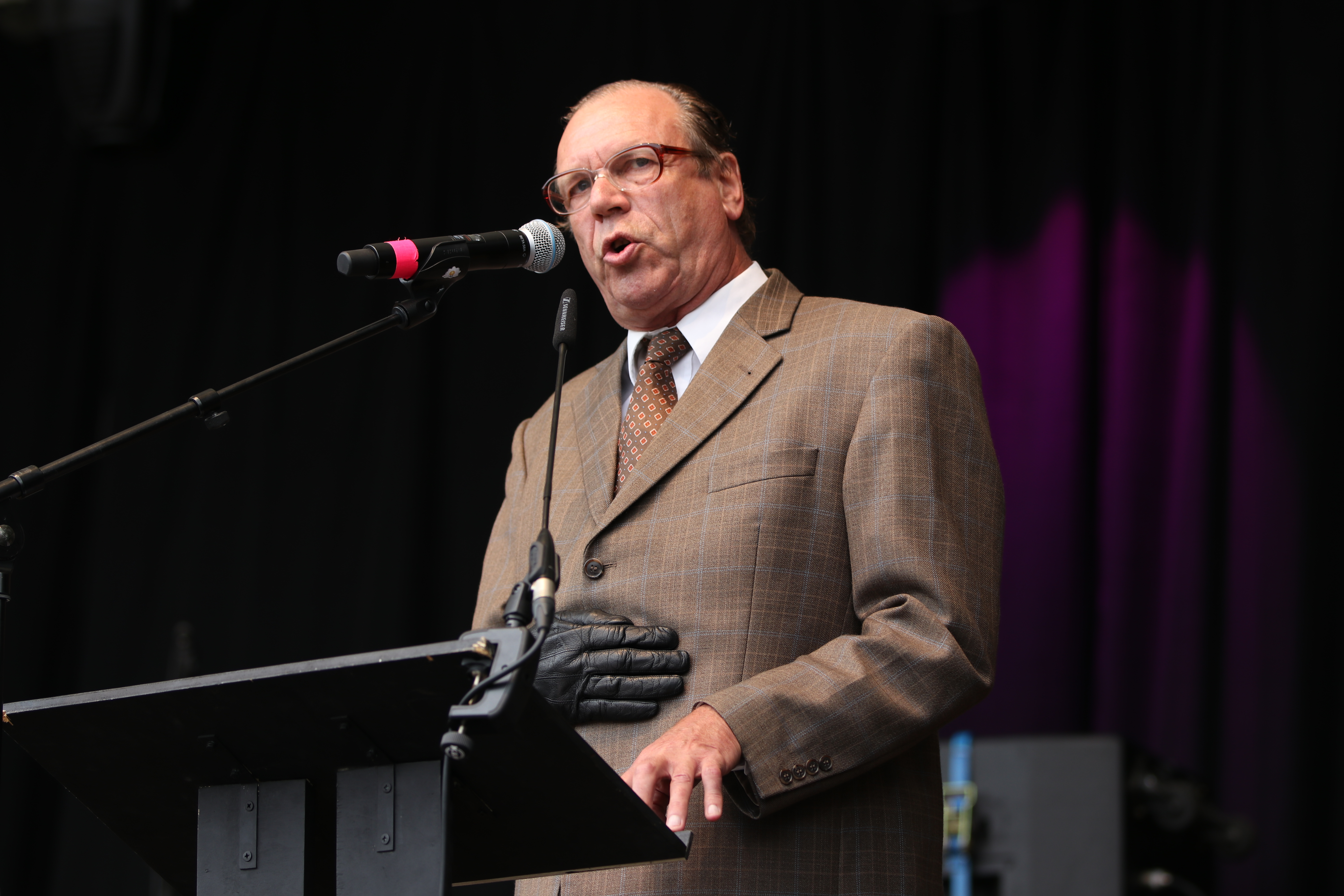 Ausgehetzt, Demonstration in München am 22. Juli 2018 gegen den Rechtsruck in der bayerischen Politik